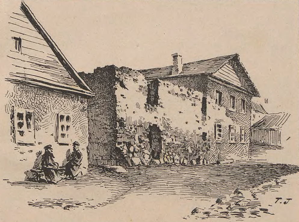 Беларуская (тарашкевіца): Мерач (Mierač), руіны дома, у якім памёр кароль і вялікі князь Уладзіслаў Ваза (Uładzisłaŭ Vaza)